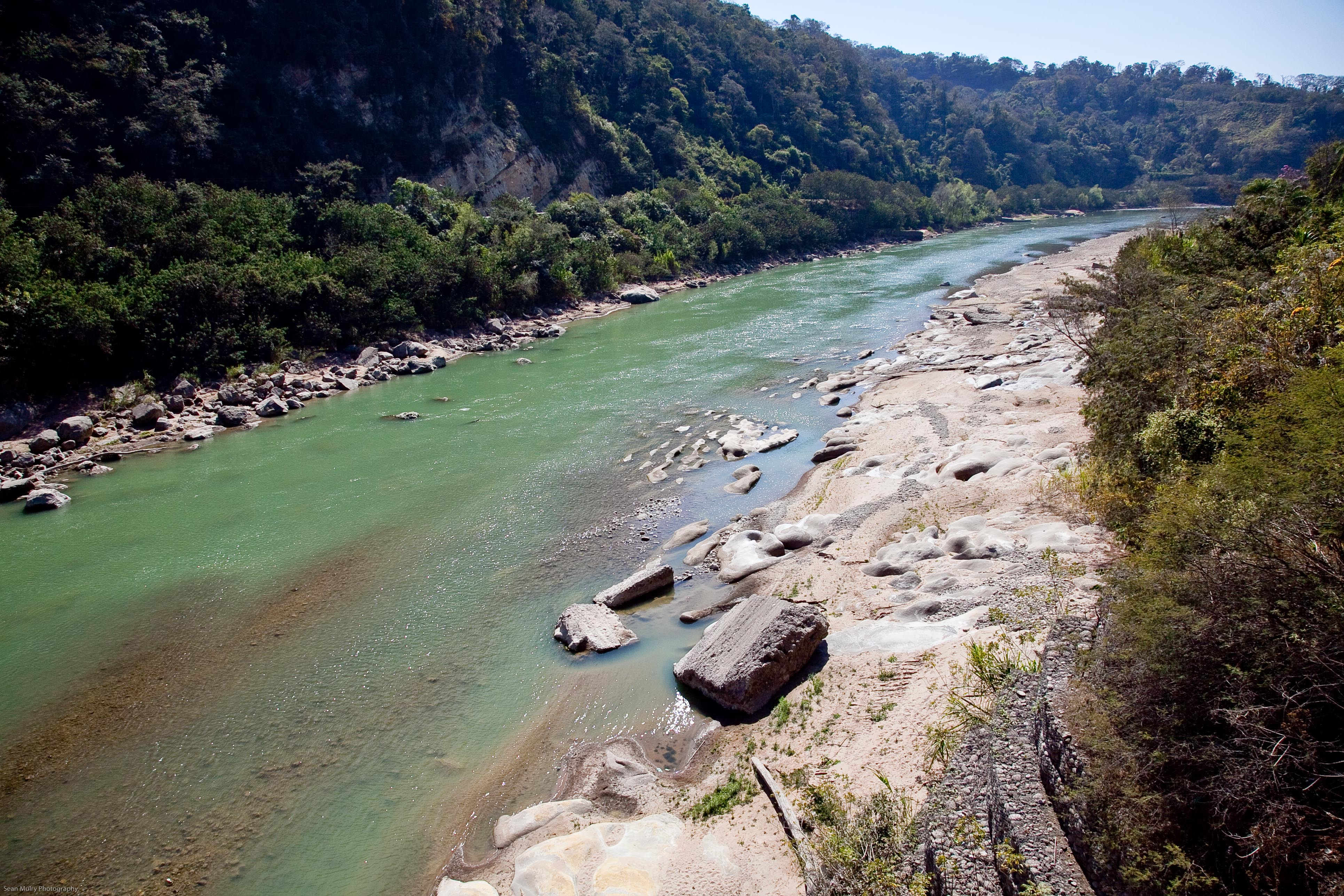 Bolivia Argentina Border